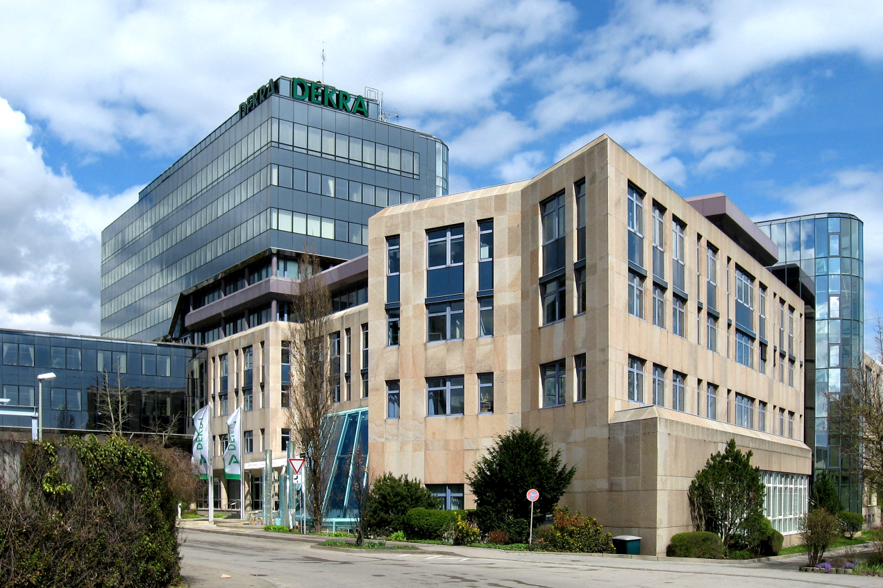 Dekra-Zentrale in Stuttgart-Möhringen